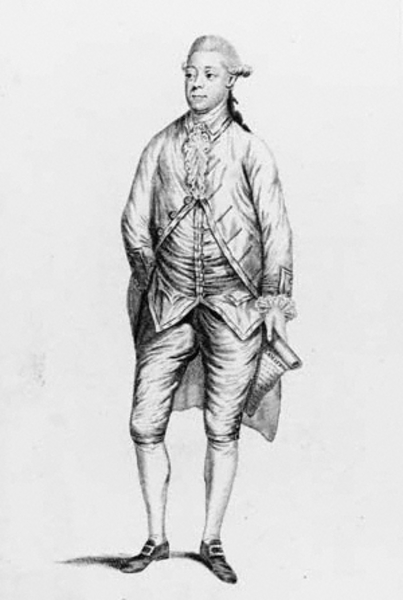 George Ogle (1742-1814)